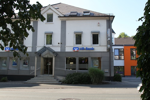 Hauptstelle der VR-Bank Freudenberg-Niederfischbach eG